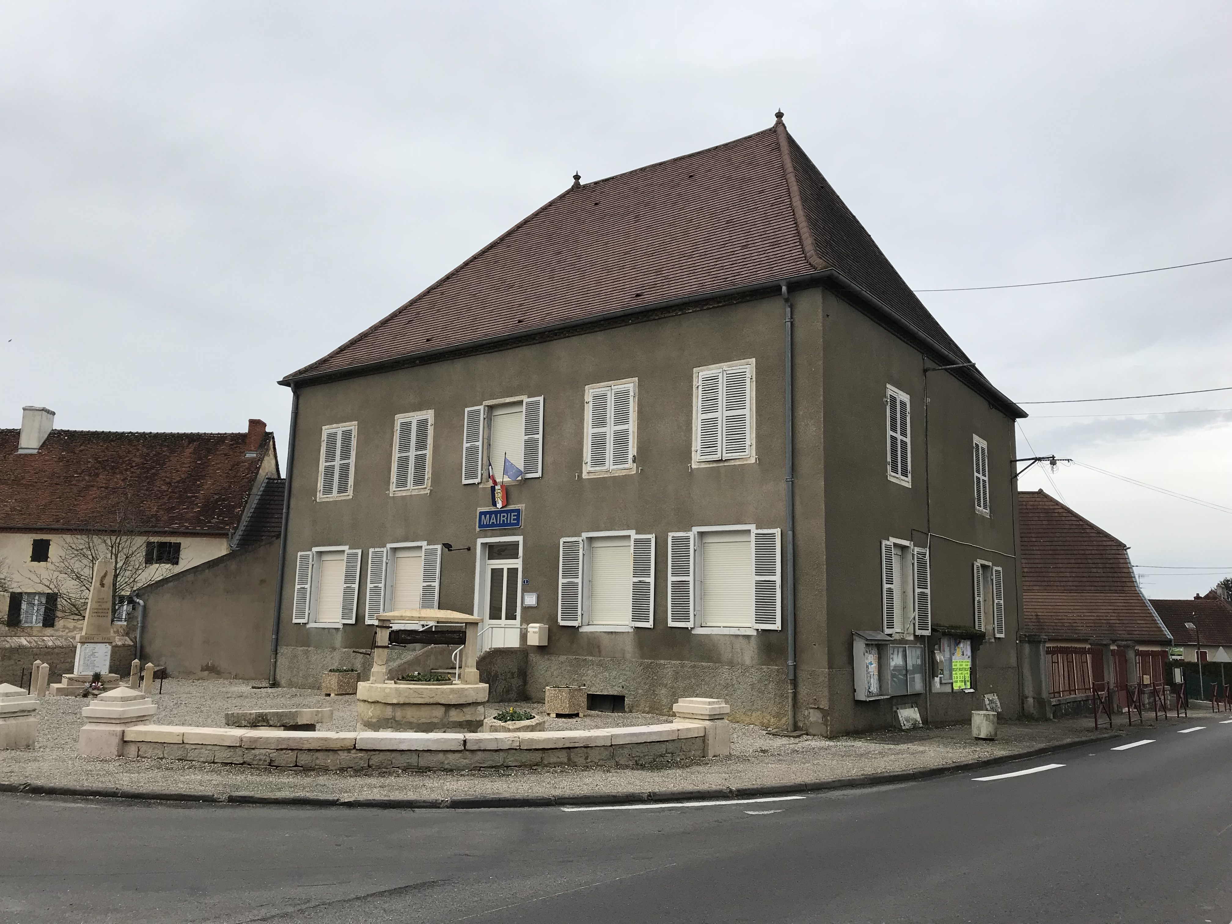 Tassenières (Jura, France) en janvier 2018.